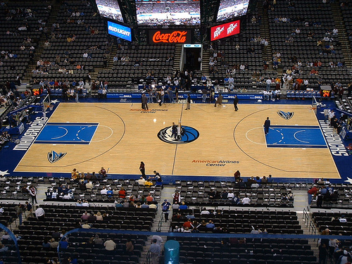 auteur: dherrera_96